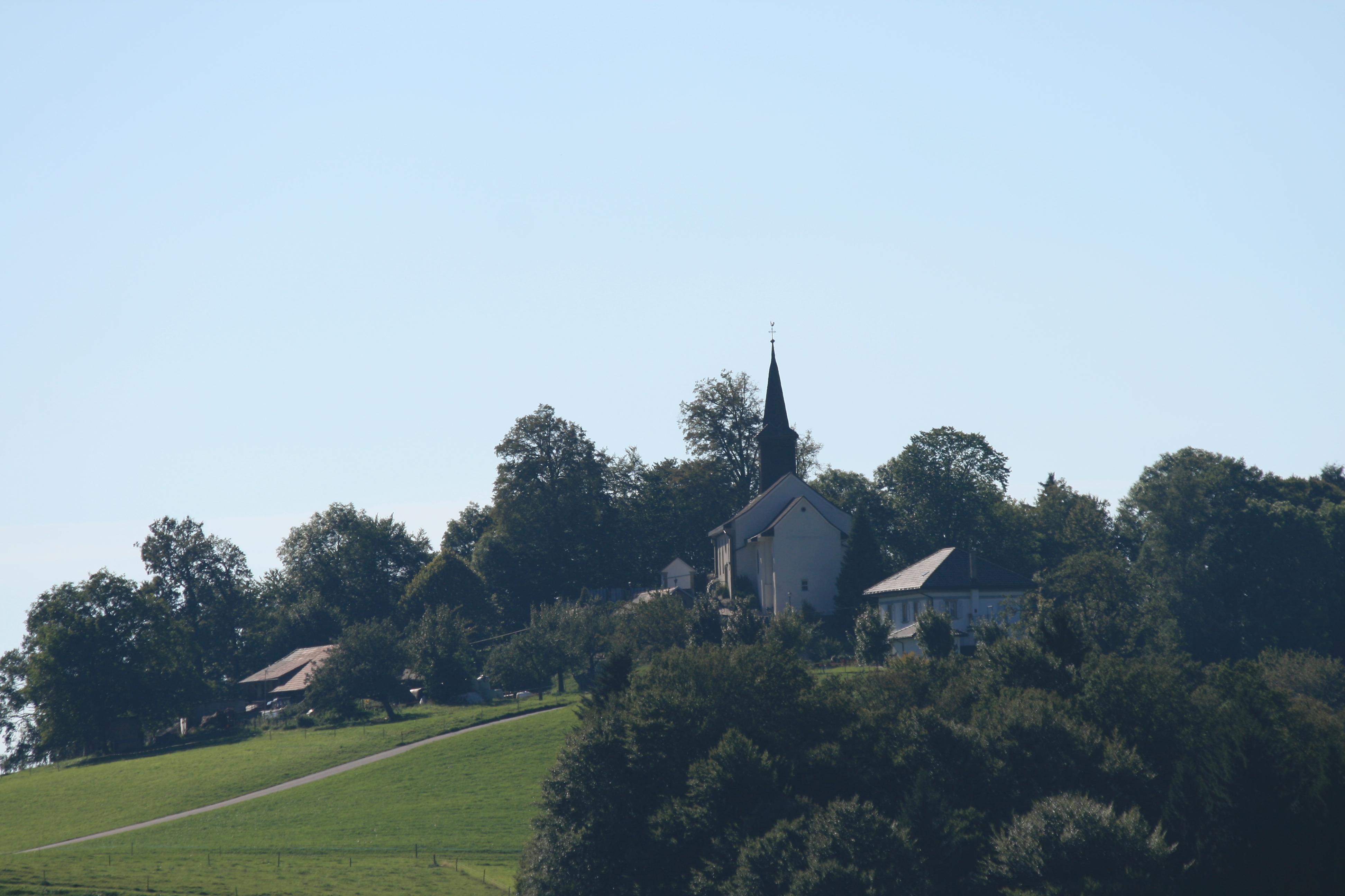 Röm.-kath. Kirche und Pfarrhaus von St. Silvester, Kanton Freiburg, Schweiz